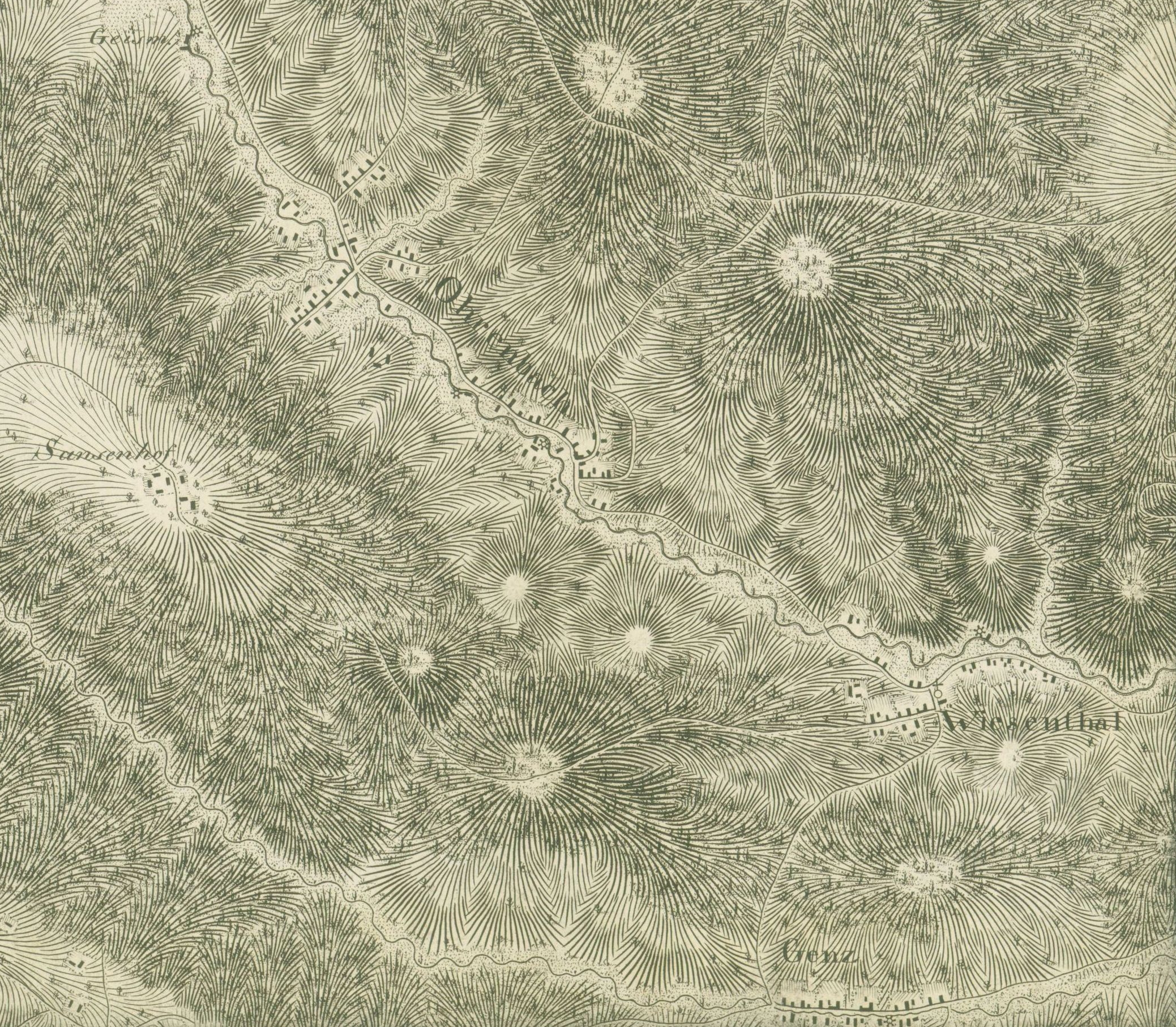 Auschnitt aus Blatt 16 der Haas´schen Karte mit den Dörfern Ohrenbach und Wisenthal. ACHTUNG die Karte muss etwa 30° im Uhrzeigersinn gedreht werden, damit Norden oben ist.